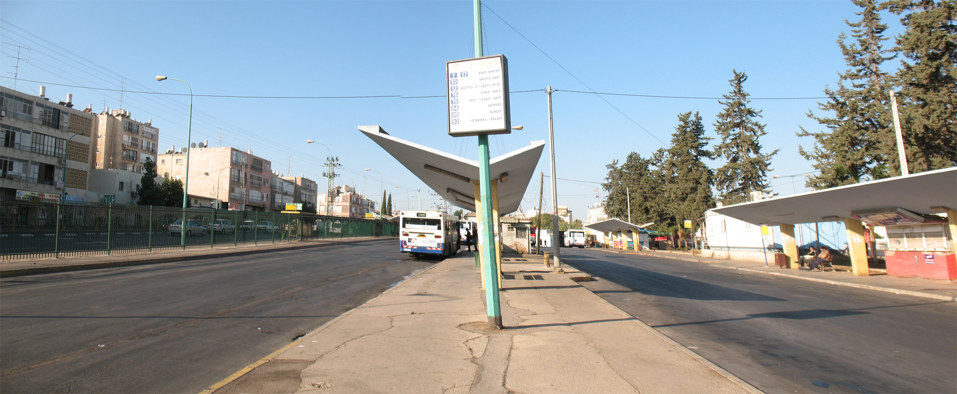 Petah Tikva Central Bus Station - Dan terminals